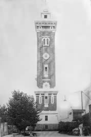 Inauguración de la Torre Ader